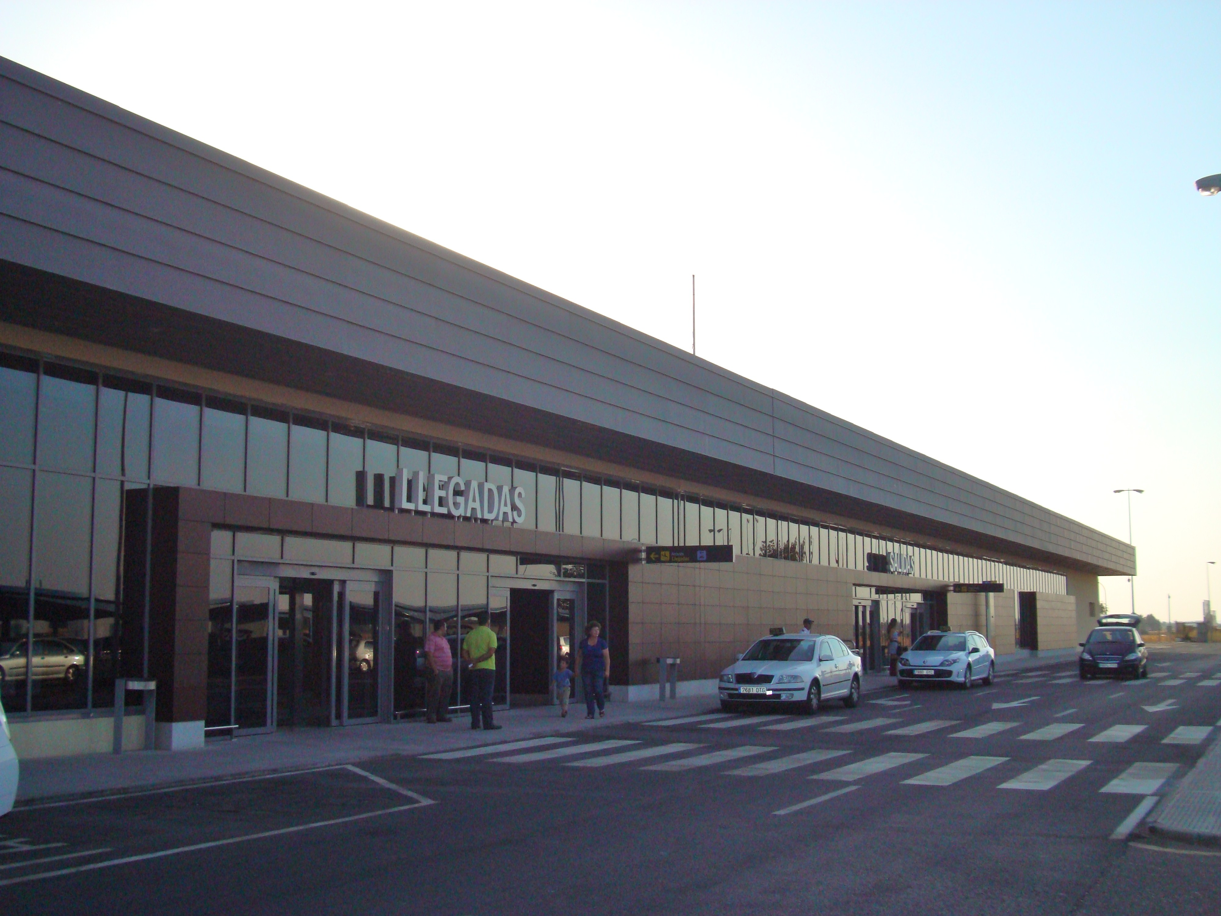 El aeropuerto de Badajoz recién inaugurada su remodelación